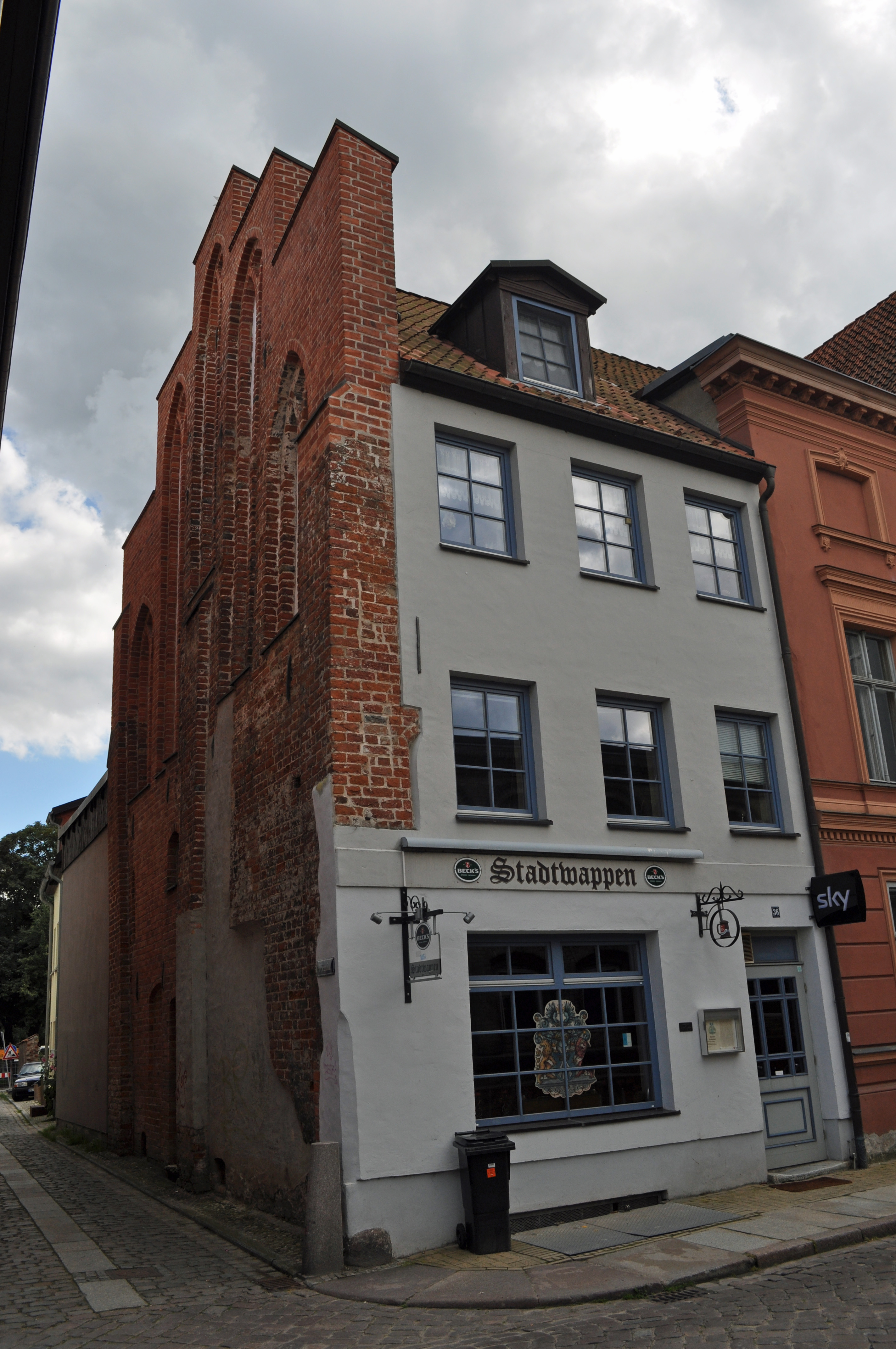 Das Foto zeigt ein Haus (bzw. Details des Hauses) in der Frankenstraße in Stralsund, Deutschland. Die Hausnummer steht im Dateinamen. Aufgenommen am 19. Juli 2011 vom Benutzer:Klugschnacker.